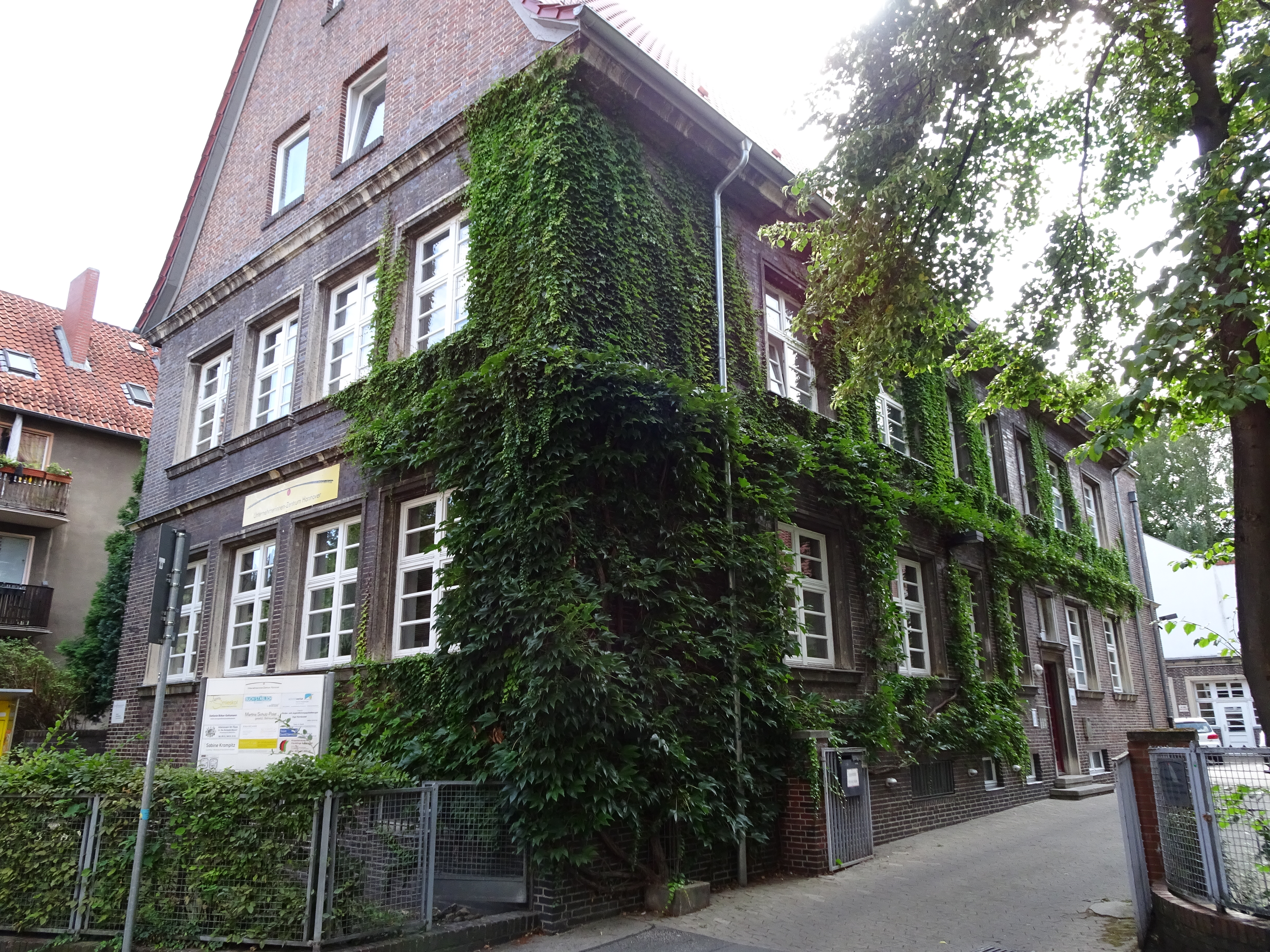 Gebäude in der Hohen Straße 11 in Hannover